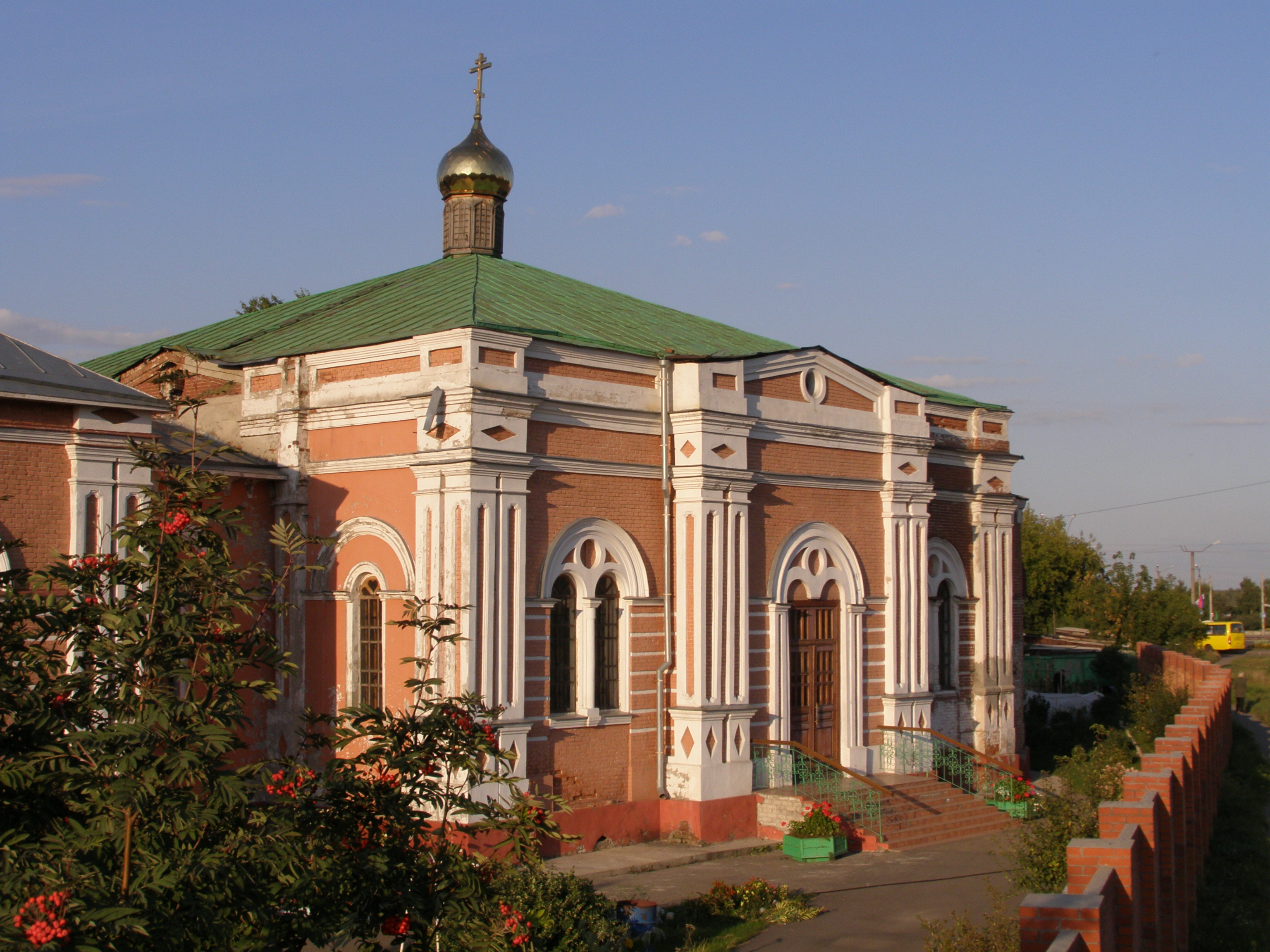 Знаменский монастырь (Барнаул). (Барнаул, ул. Большая Олонская, 24)